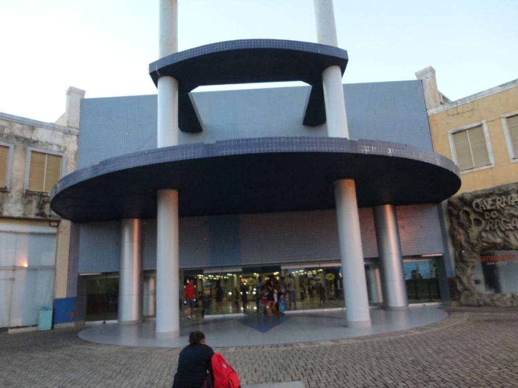 Foto da fachada do Cinema UCI Aeroclube